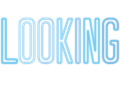 Logo de la série Looking